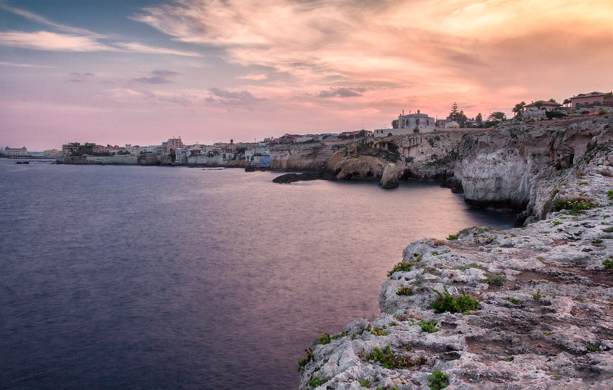 Siracusa, Ponente (Cappuccini)